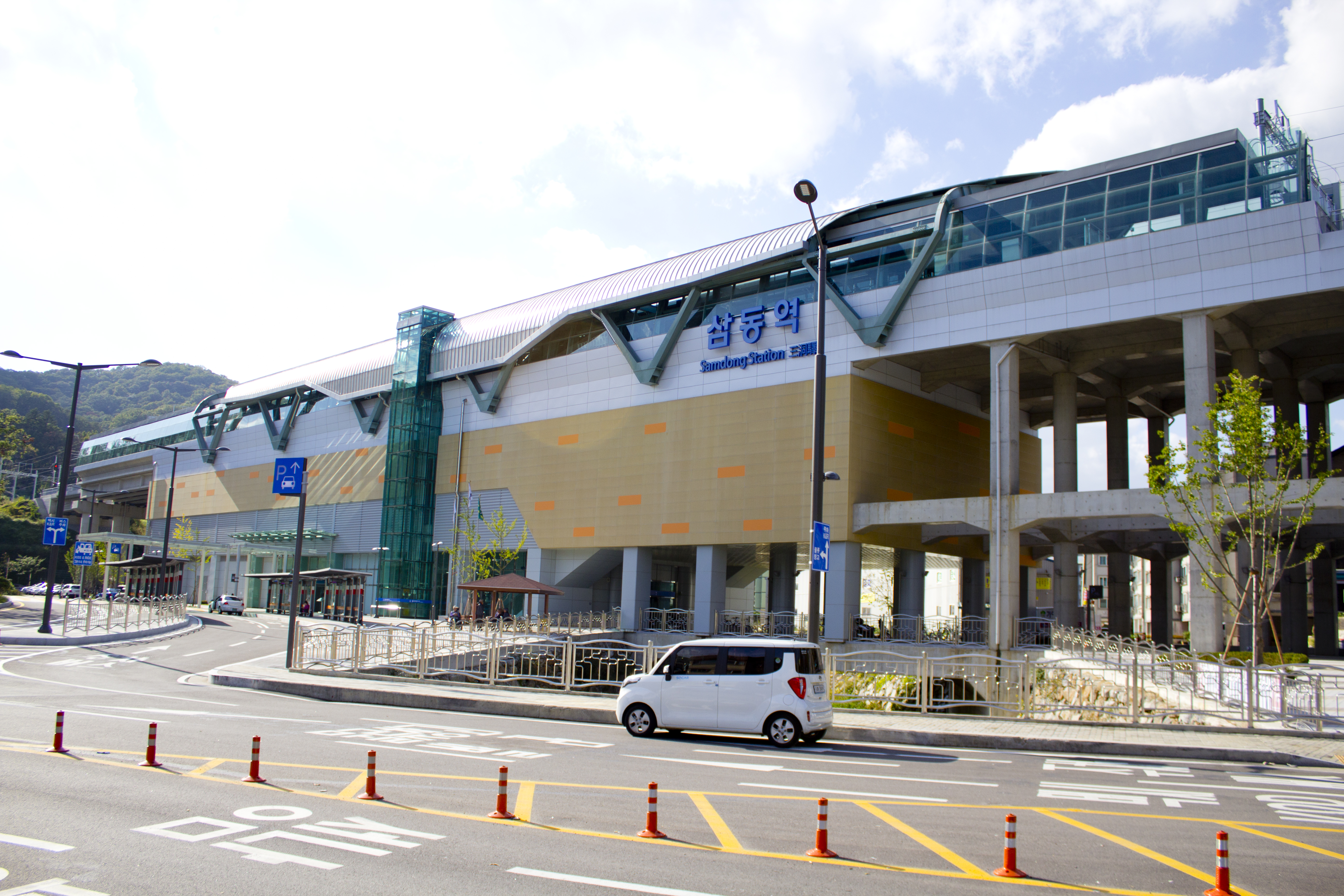 경강선 삼동역 전경